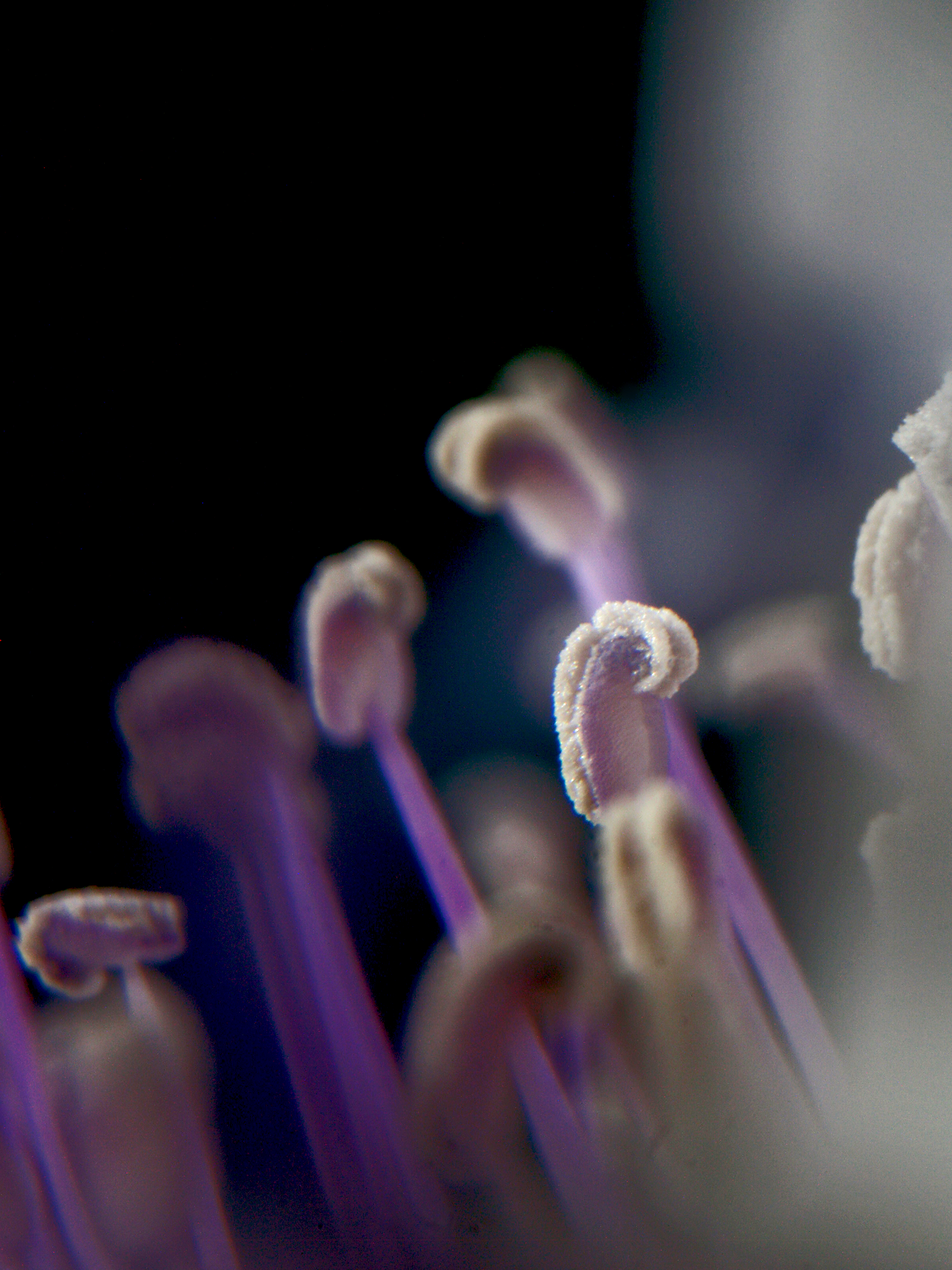 Estambre alcaparro